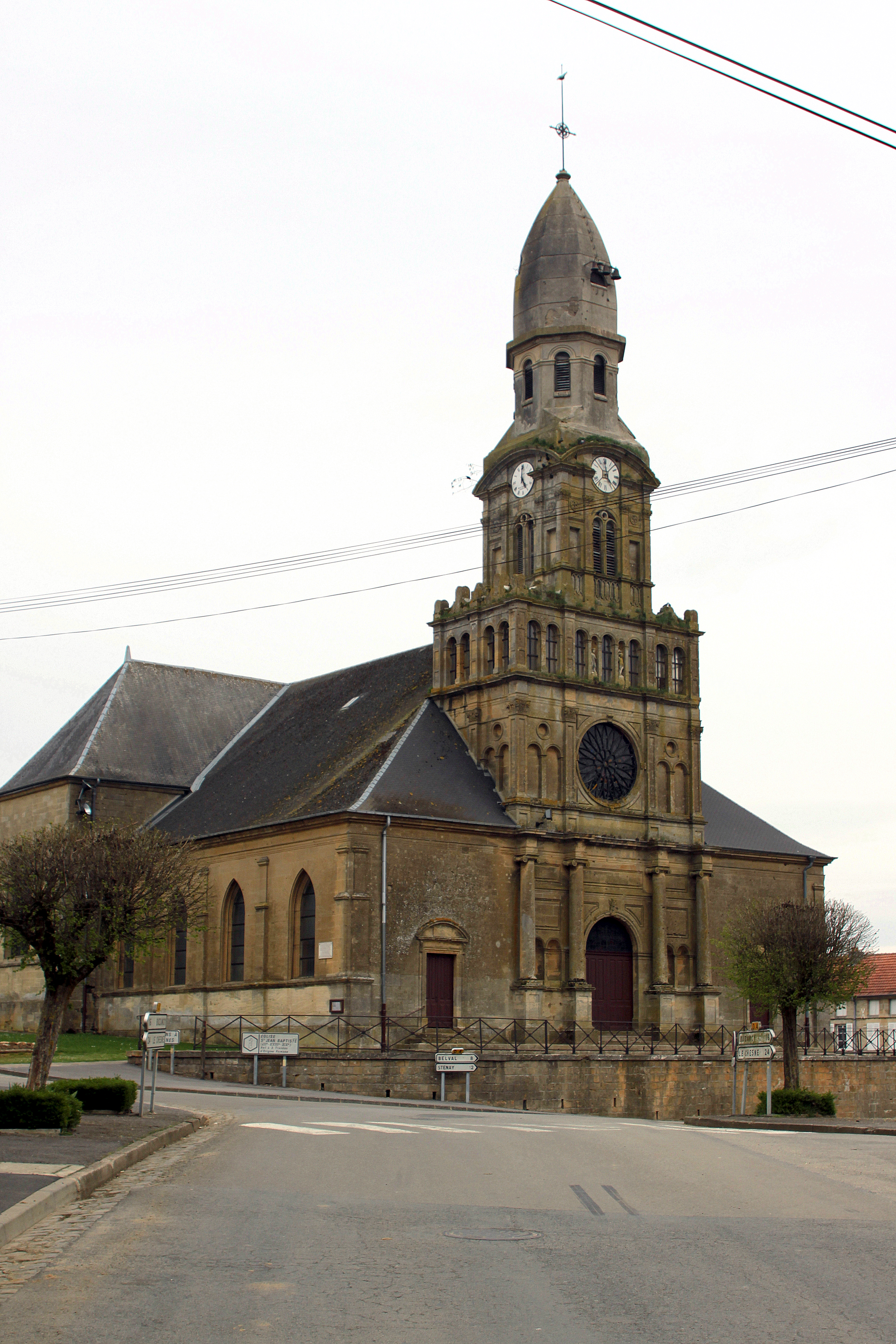 D'Kierch vu Beaumont-en-Argonne